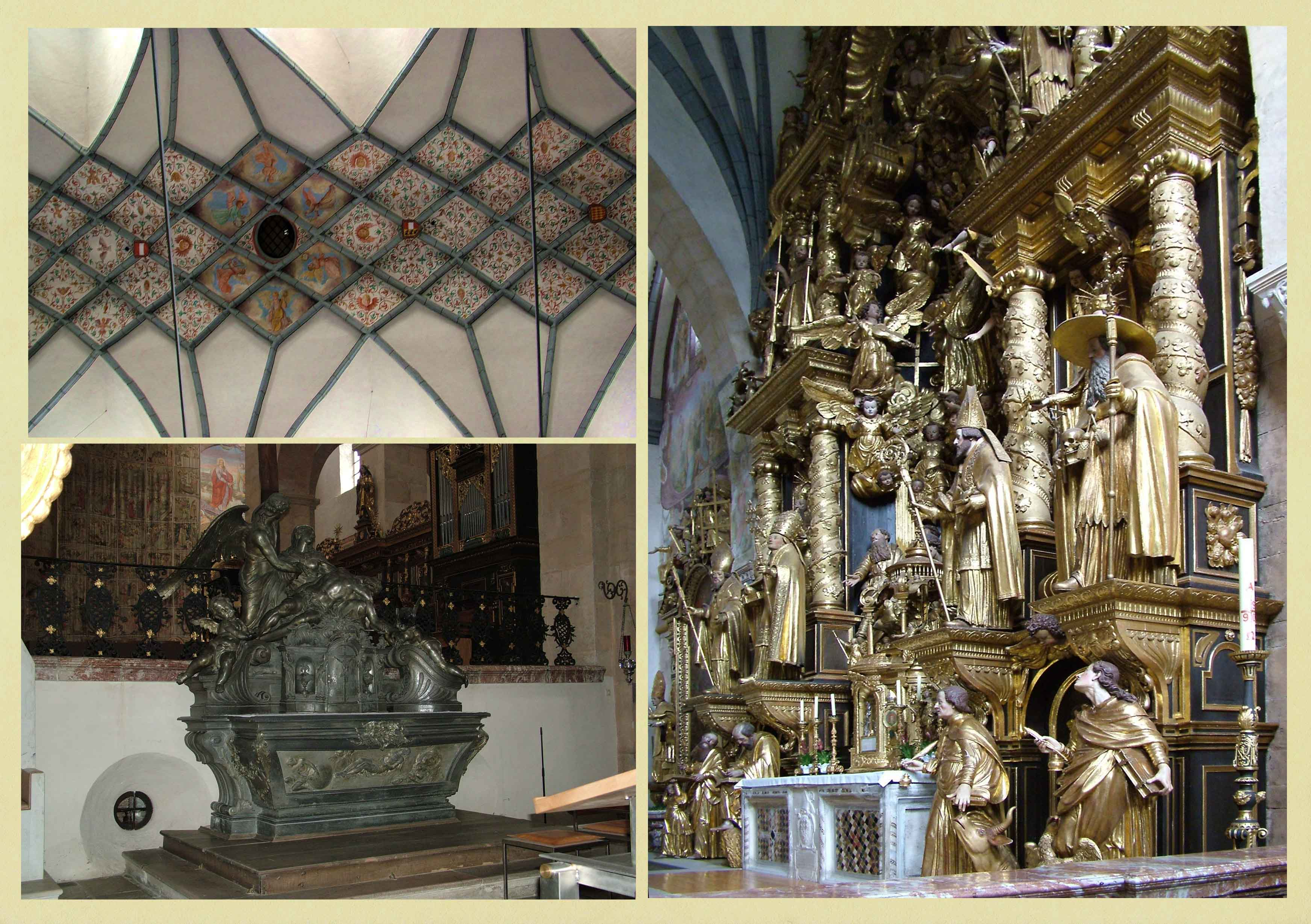 Gurki székesegyház (Ausztria): a fő- és keresztoltárok a főhajóban, valamint a főhajó festett hálóboltozata